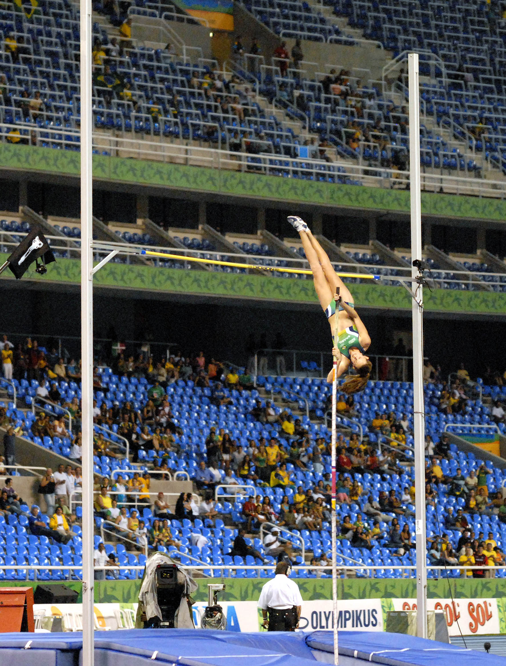 Rio de Janeiro - A paulista Fabiana Murer conquistou a medalha de ouro no salto com vara, ao elevar em 20 centrímetros o antigo recorde pan-americano de 4,40 metros